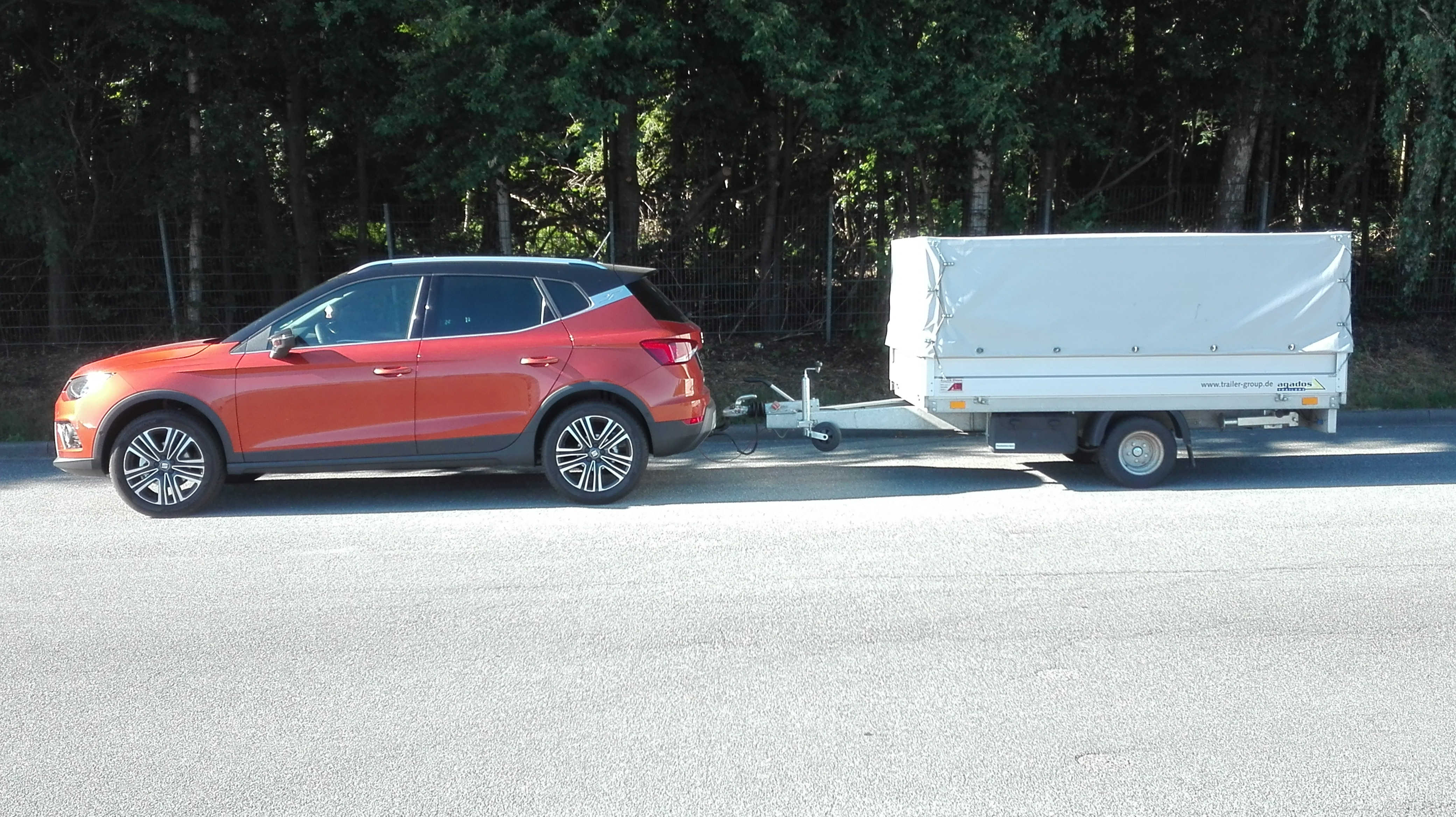 Arona mit Hochlader